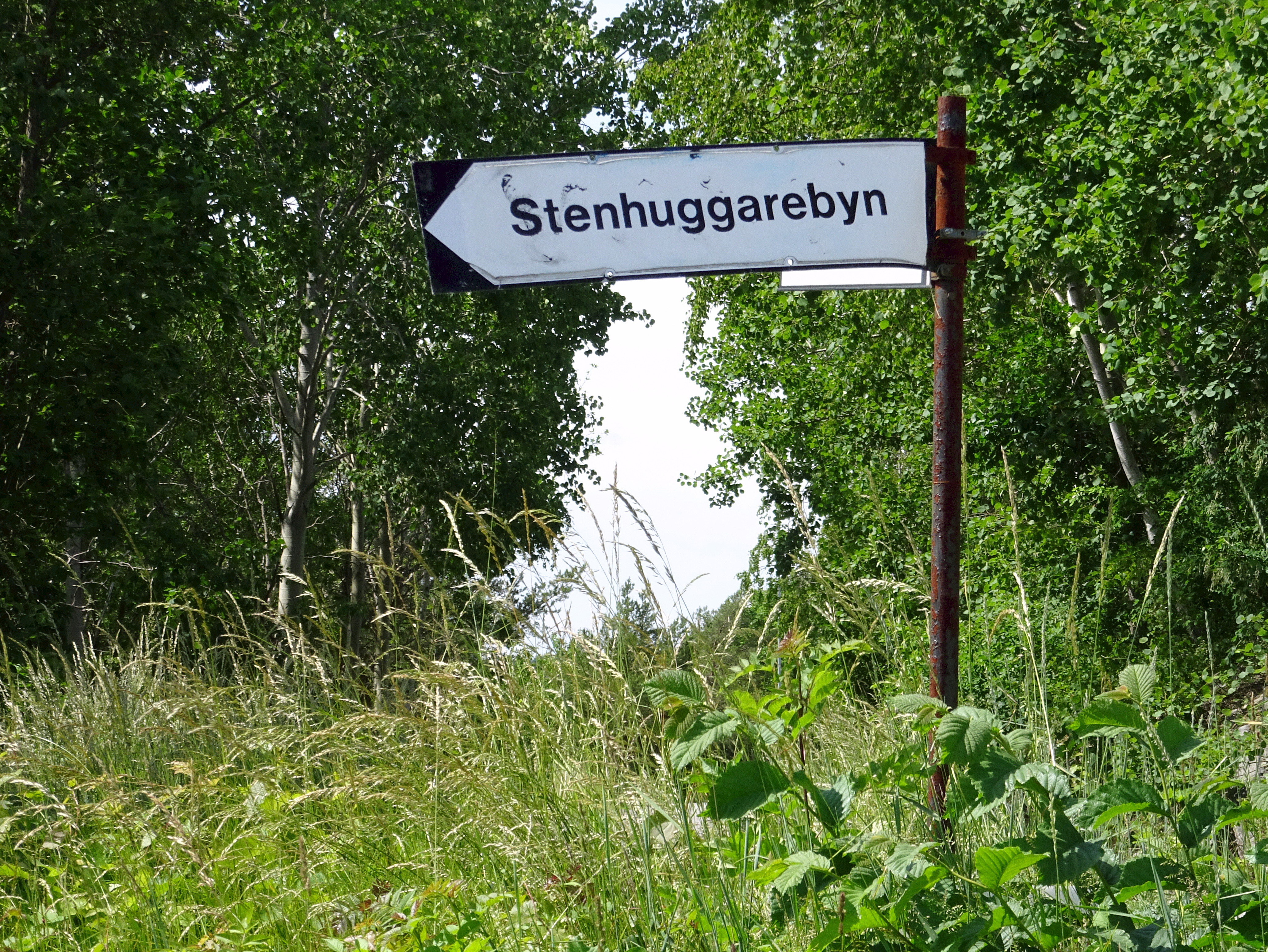 Stenhuggarbyn